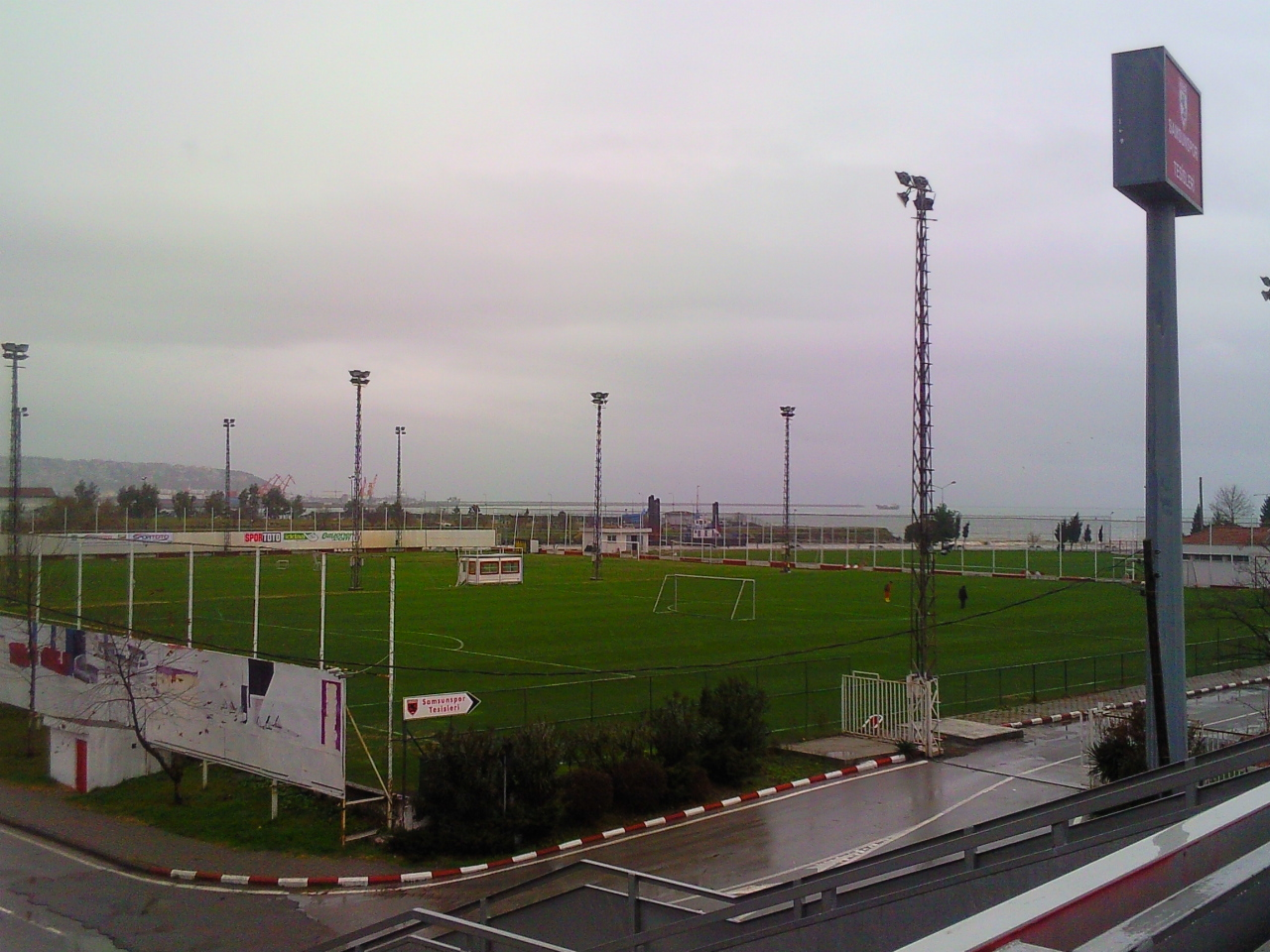 Nuri Asan Tesisleri'nde yer alan idman sahaları.